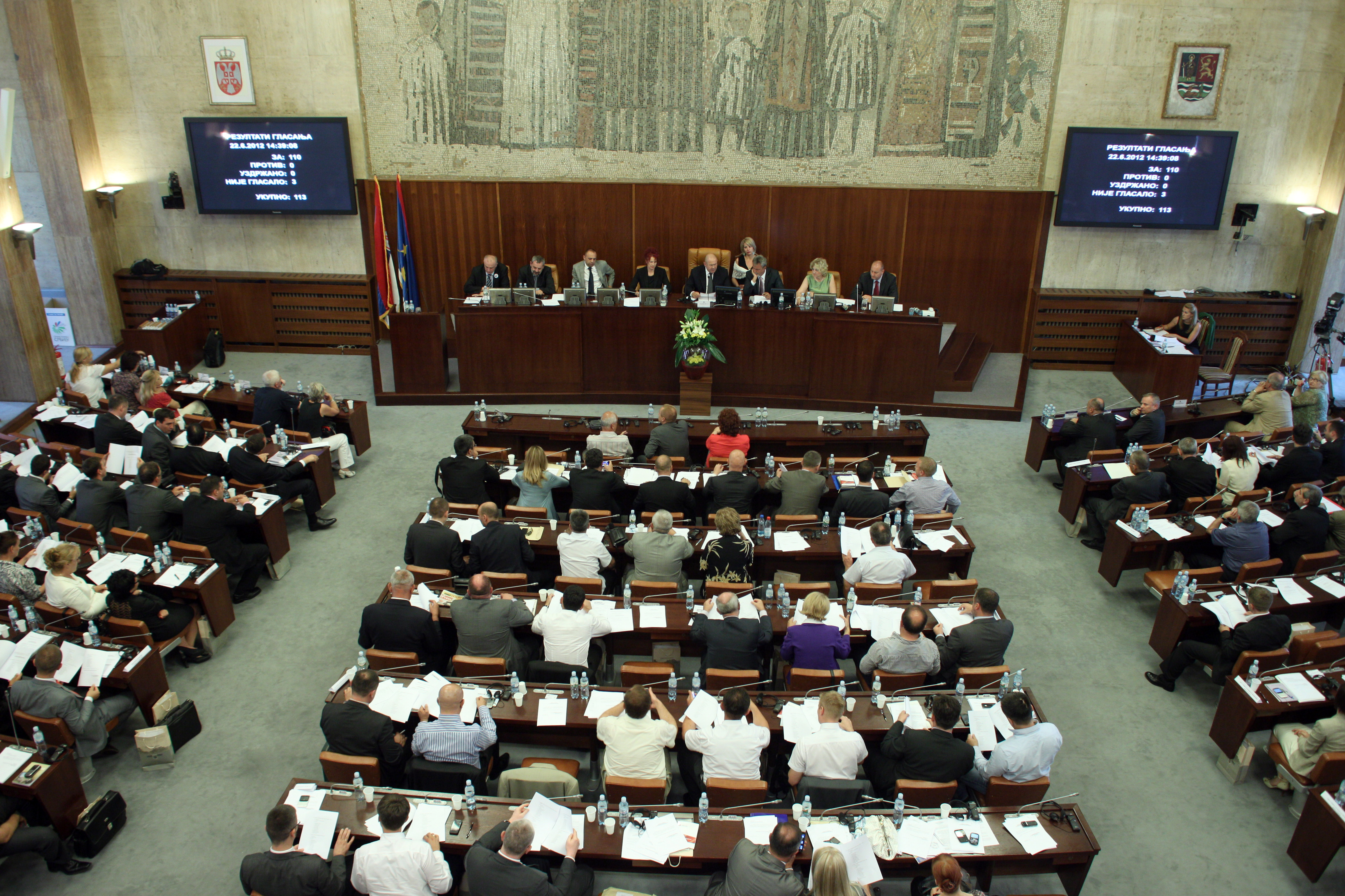 Konstitutivna sednica Skupštine AP Vojvodine održana 22. juna 2012. godine.